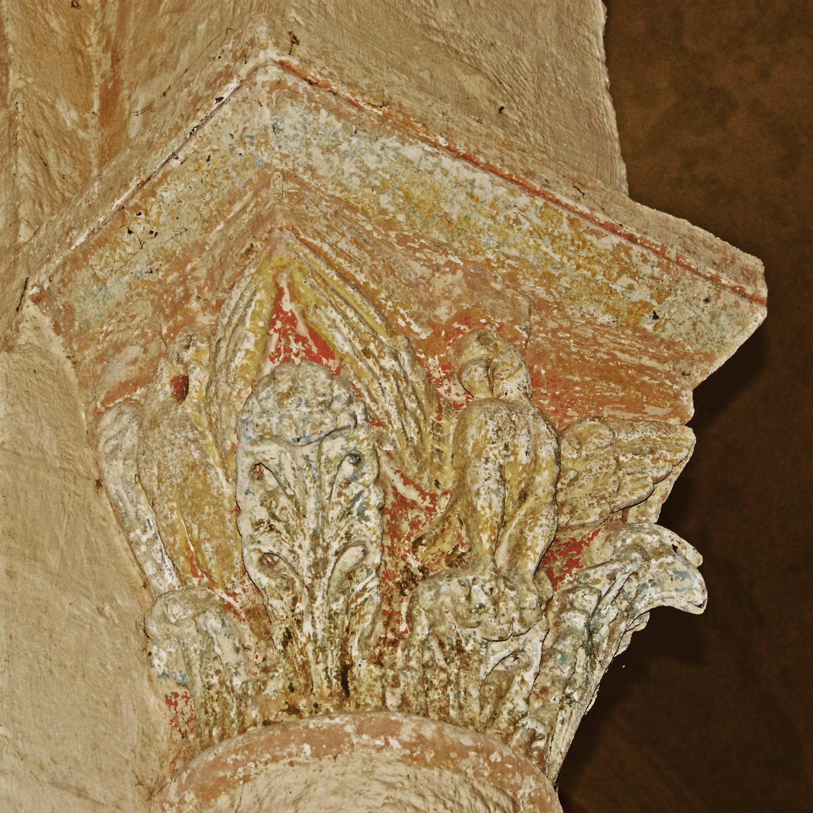 St.-Jean Glaine-Montaigut, Kapitell, drei Adler breiten ihre Schwingen aus